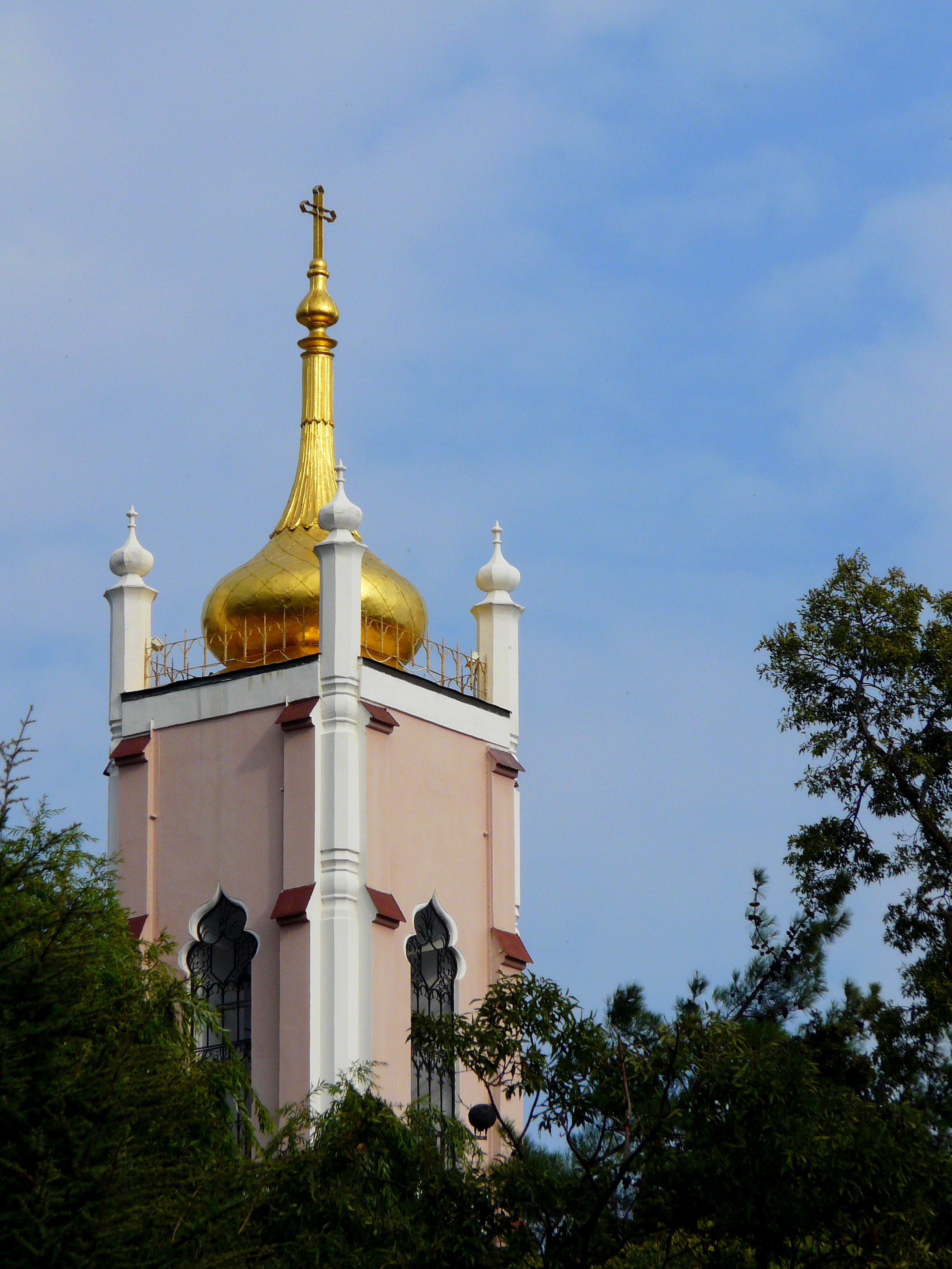 Дзвіниця колишньої церкви Івана Златоуста, Ялта, вул. Толстого, 10